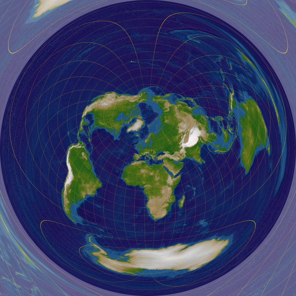 Mittelabstandstreue Azimutalprojektion; Mittelpunkt: Berlin (52°31'00" N, 13°23'40" O)